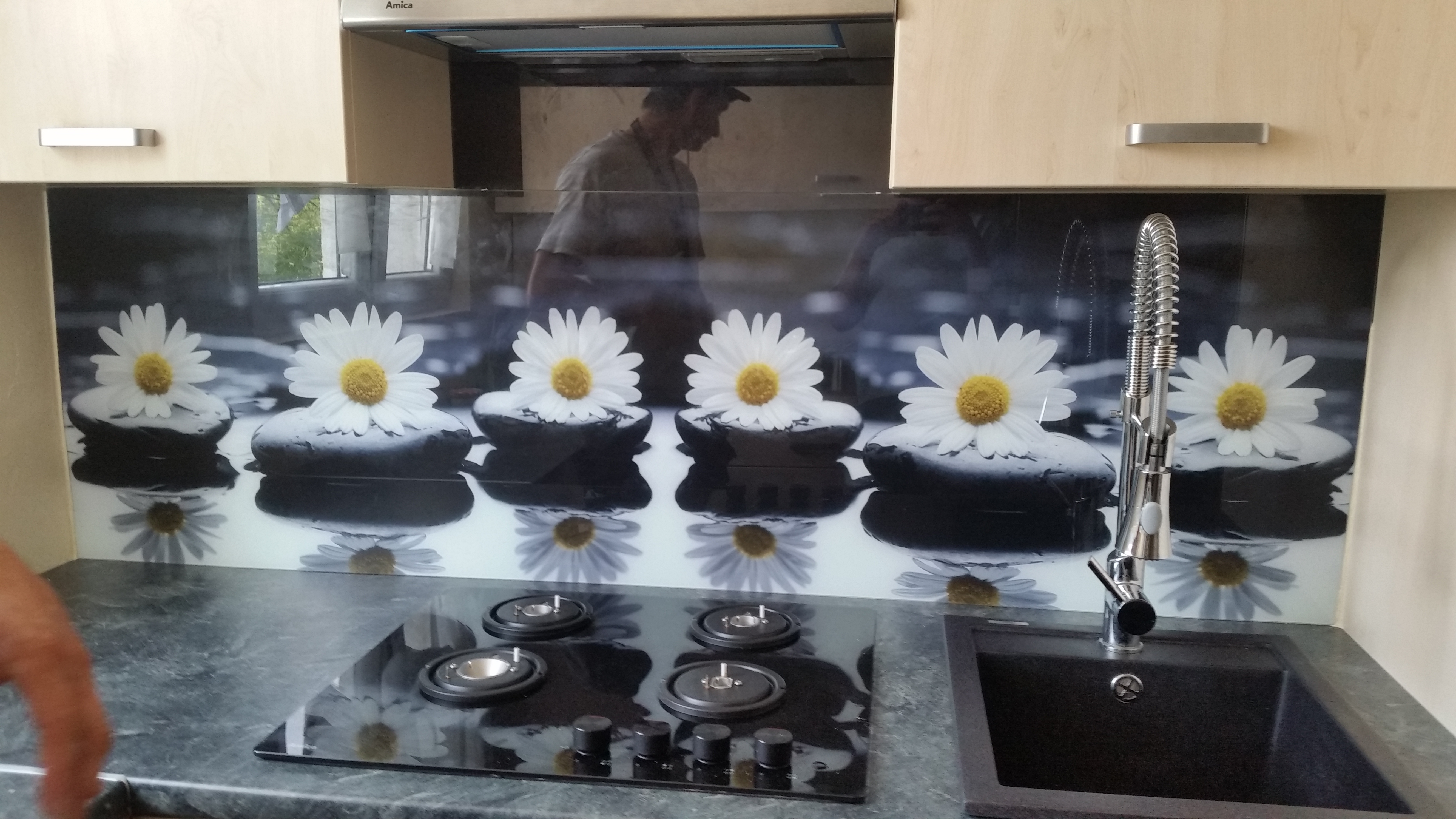 szkło laminowane z grafiką Opus Glass